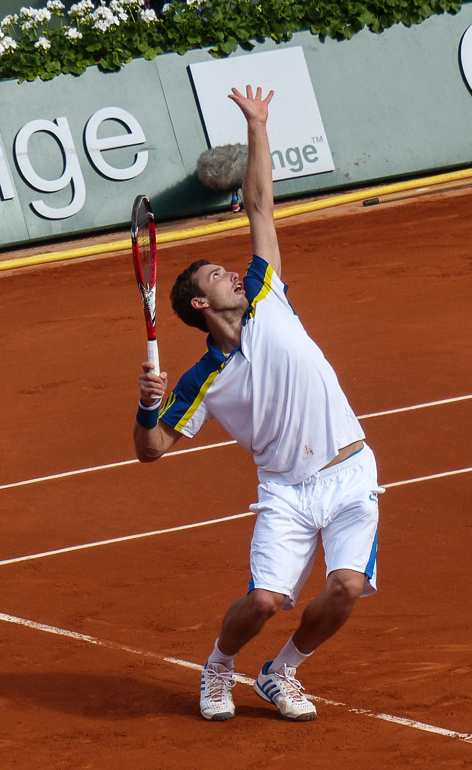 2ème tour Roland Garros 2013 : Gael Monfils (FRA) def. Ernests Gulbis (LAT)